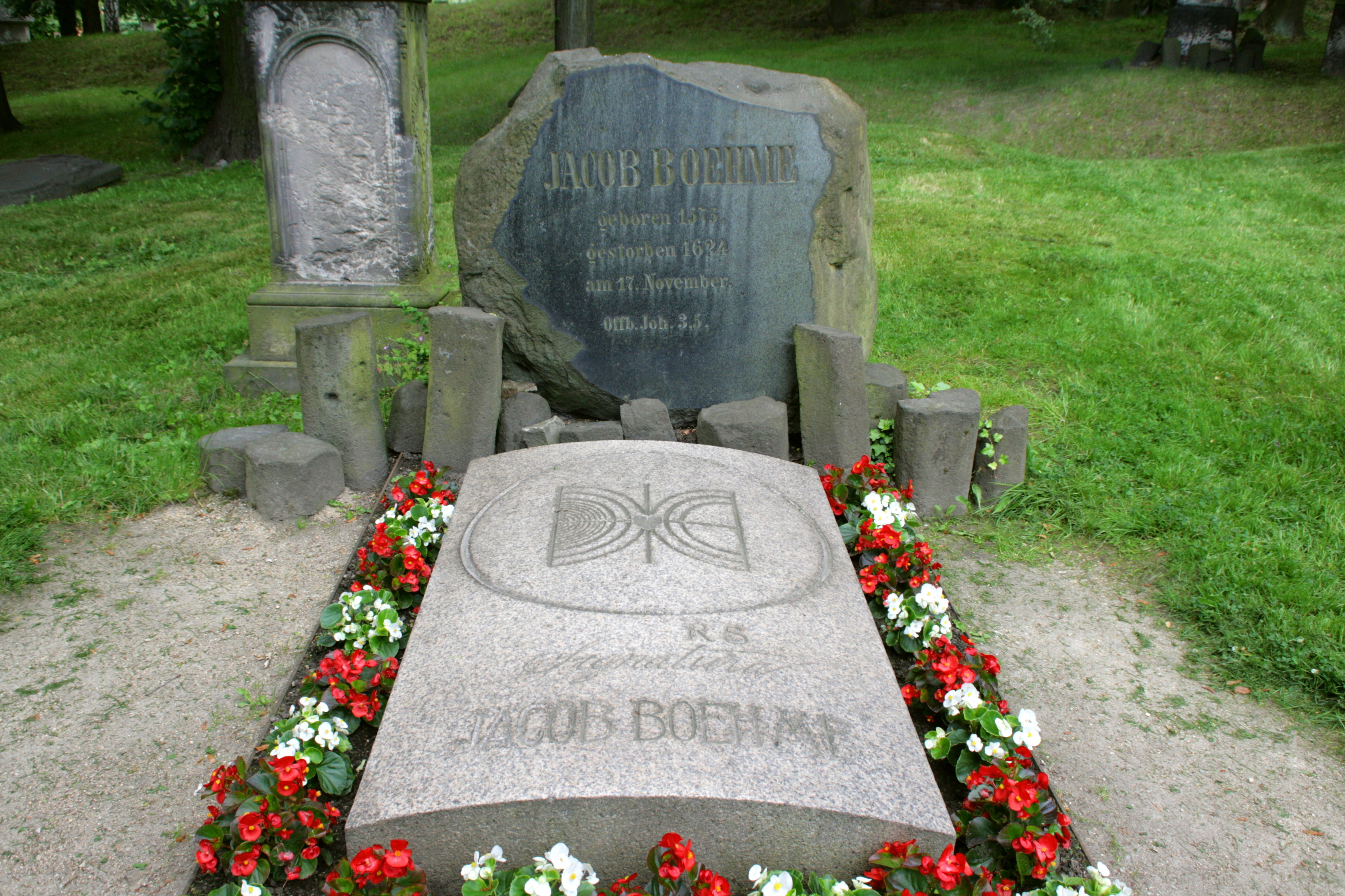 Grab von Jakob Böhme, Nikolaikirchhof, Bogstraße in Görlitz